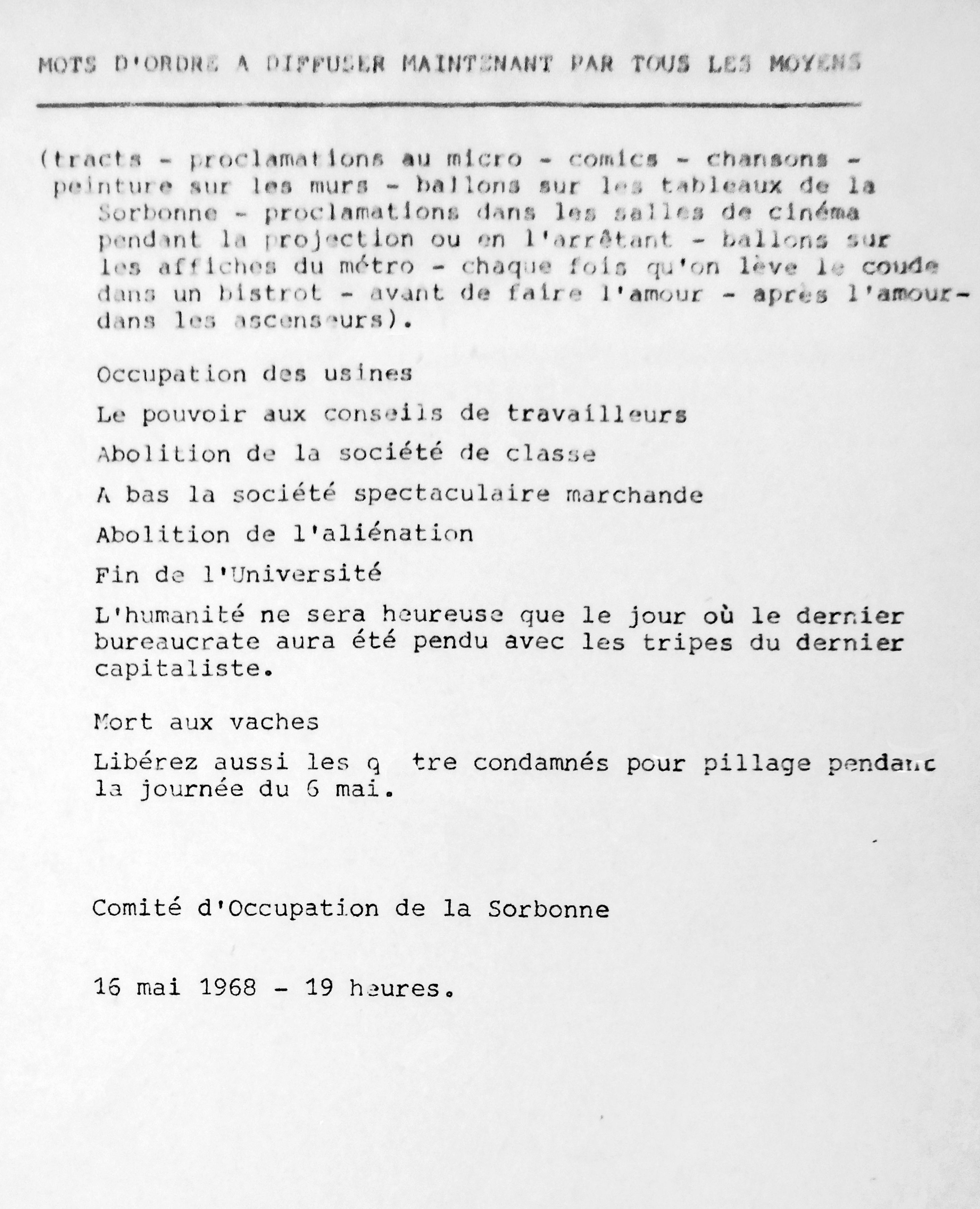 Tract du comité d'occupation de la Sorbonne du 16 mai 1968, 19h Mouvement de Mai 68 Article de Wikipedia sur Mai 68